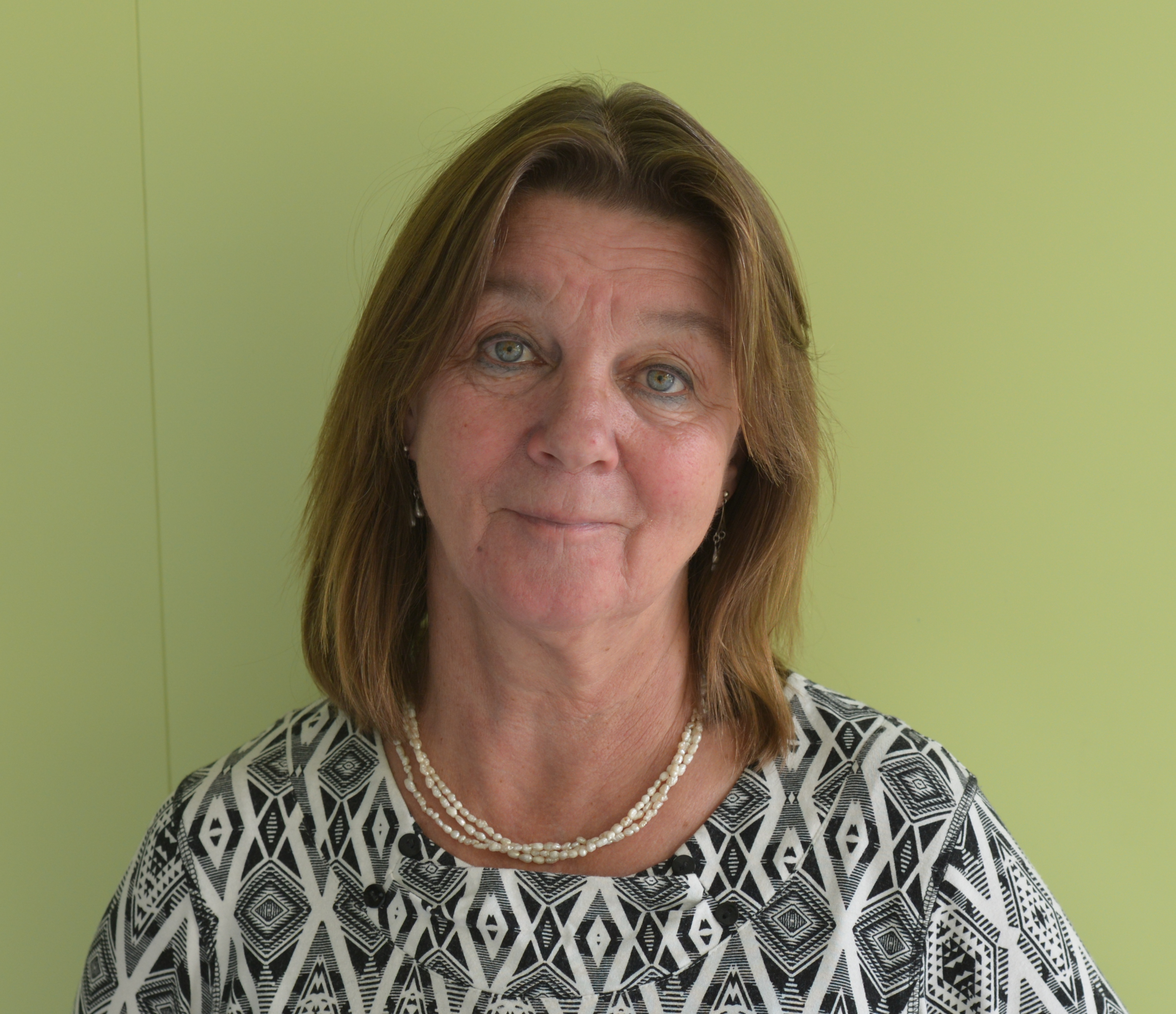 Författaren Elisabeth Rynell på Scener & samtal 30 september 2017 (beskuren bild).